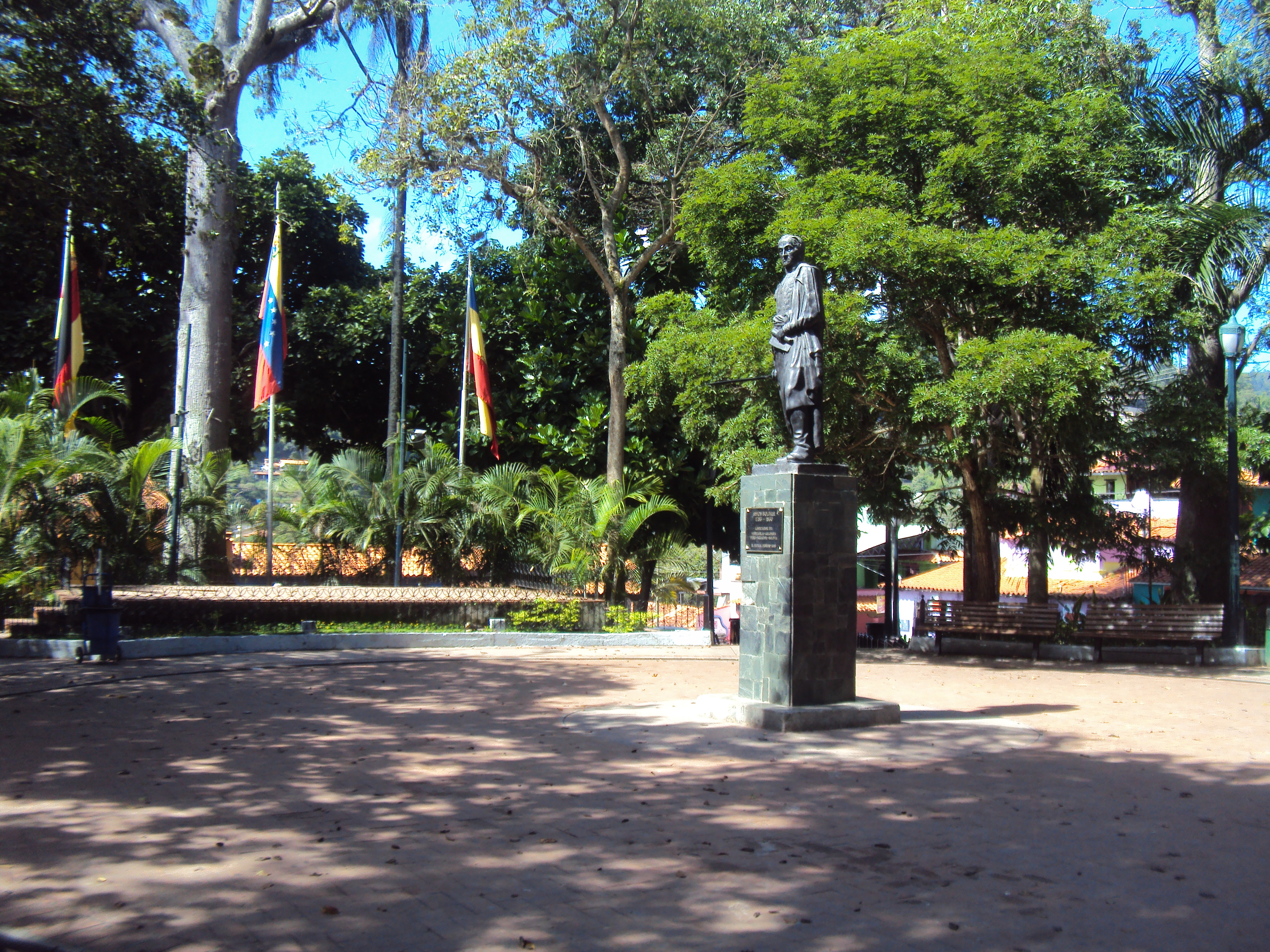 La Plaza Bolívar es uno de los sitios más concurridos del pueblo El Hatillo. En él se llevan a cabo eventos en la tarima que se observa al fondo de la imagen.